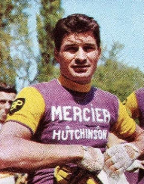 Raymond Poulidor en 1966, 'Campioni dello Sport 1966 - 1967', Panini figurina n°242.